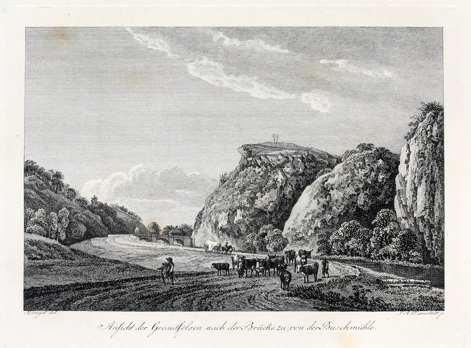 Abbildungen aus " Der Plauische Grund bei Dresden mit Hinsicht auf Naturgeschichte und schöne Gartenkunst" und "Mineralogische Beschreibung des Plauischen Grundes bis Tharand"